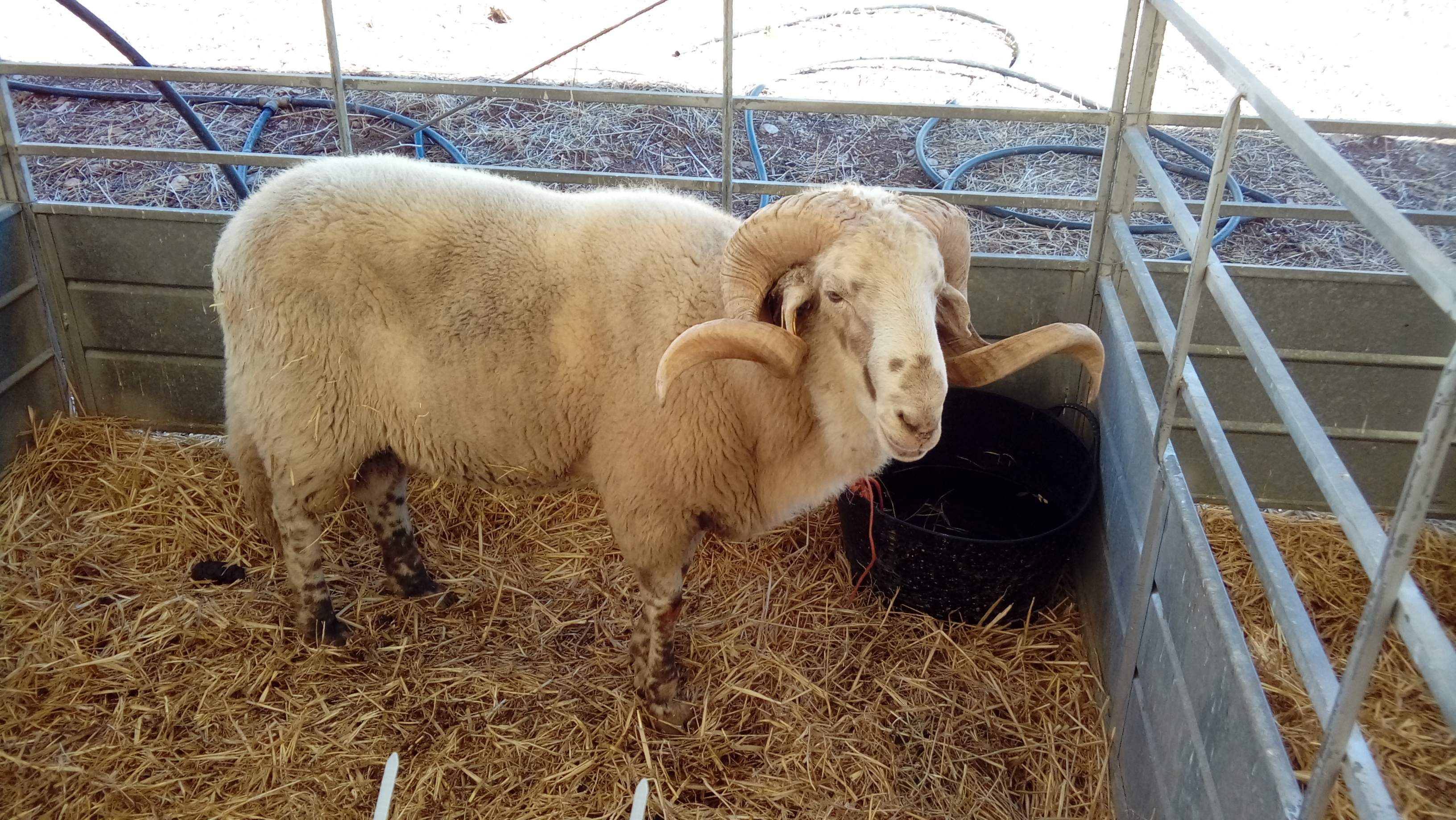 Ejemplar de raza merina de Grazalema en la Feria Ganadera de Benaocaz 2016.